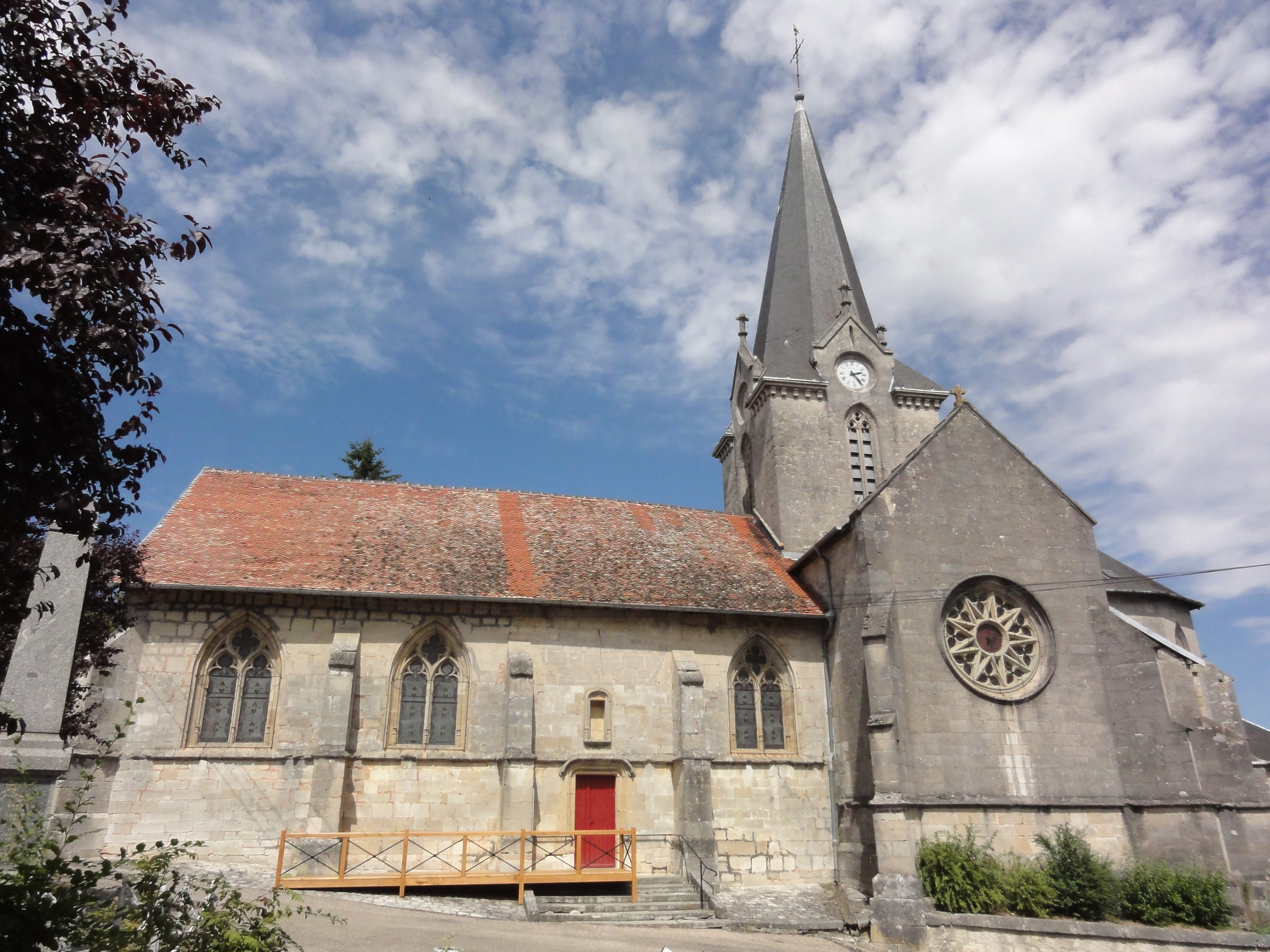 Dammarie-sur-Saulx (Meuse) église